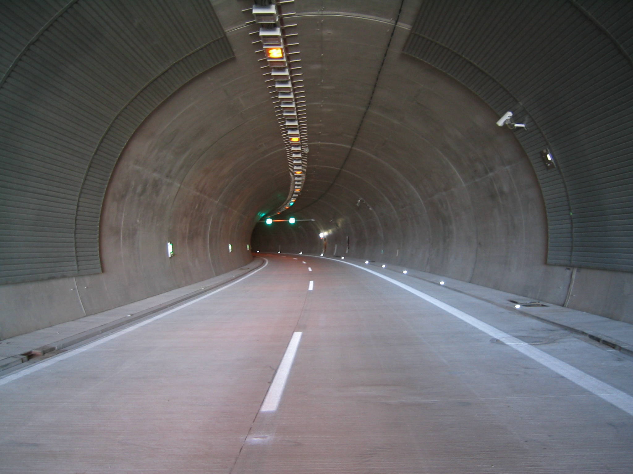 Burgholztunnel in Wuppertal. Nordröhre. Fahrtrichtung Talwärts/Bergab. Cronenberg - Sonnborn (Foto: 1 1/2 Wochen vor Eröffnung).